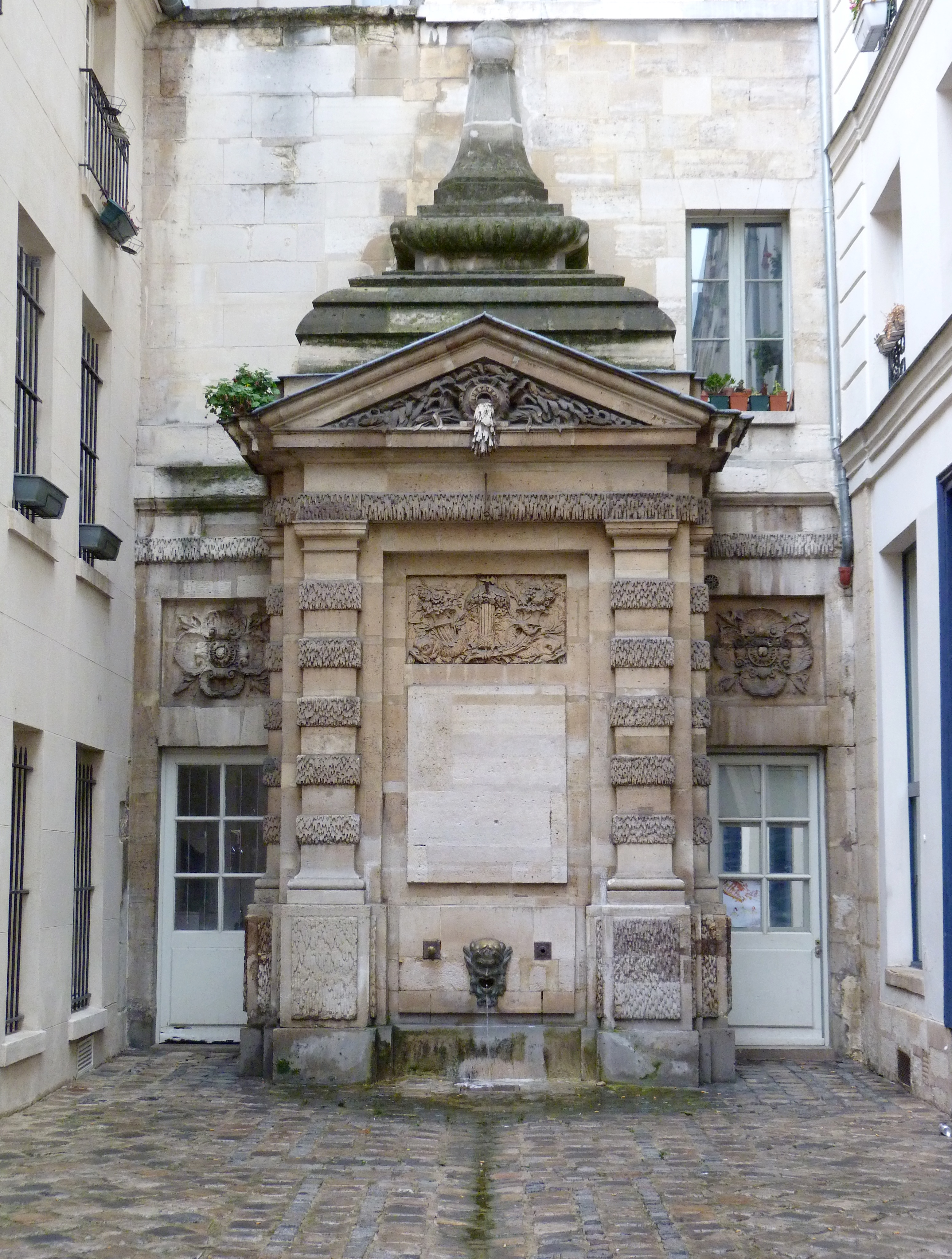 Fontaine de Jarente (1783), impasse de la Poissonnerie, Paris (4e arrondissement)